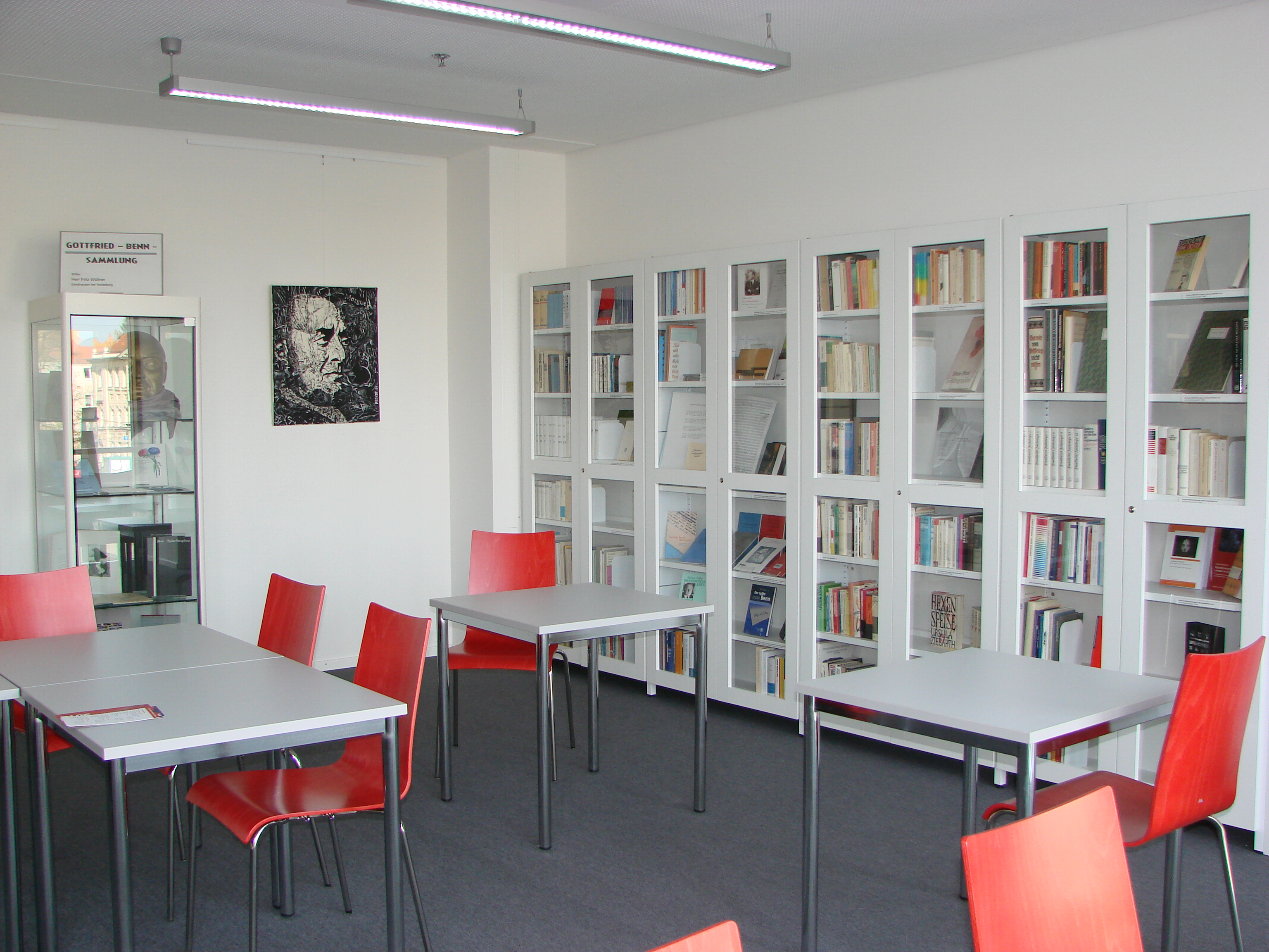 Stadt- und Landesbibliothek Potsdam, Raum mit der Sammlung Gottfried Benn